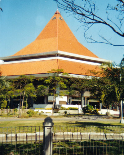 Foto van de aula van de ITS universiteit in Soerabaja, Indonesië. Door: V. van den Berg